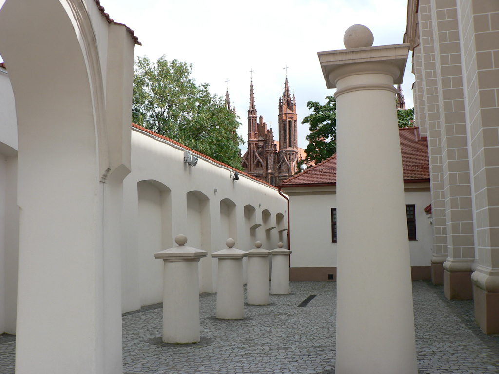 Procesijų galerija po rekonstrukcijos. 2009 m.